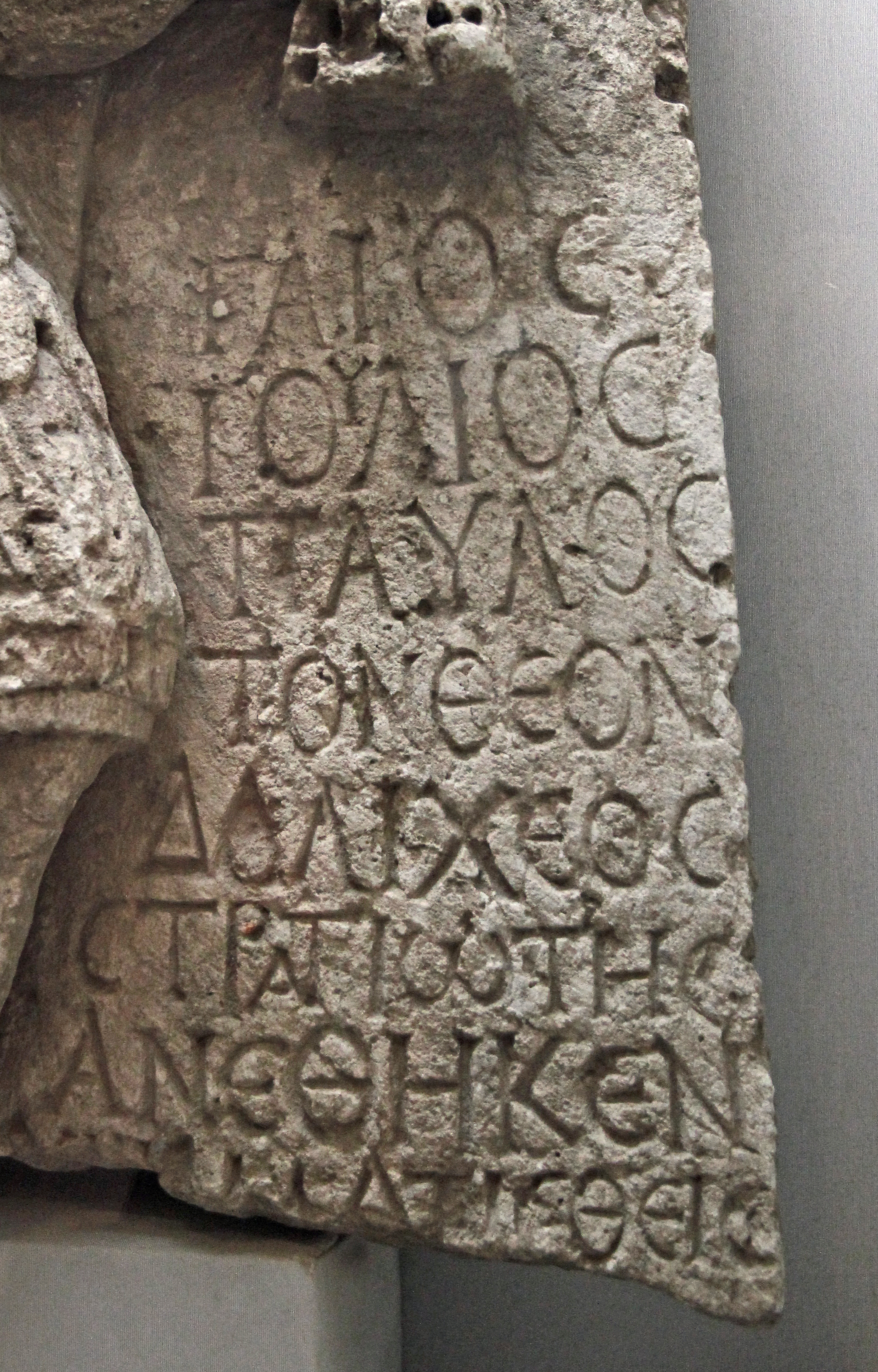 Weihrelief des Jupiter Dolichenus aus Perrhe, im Museum von Adıyaman, Weihinschrift, Türkei